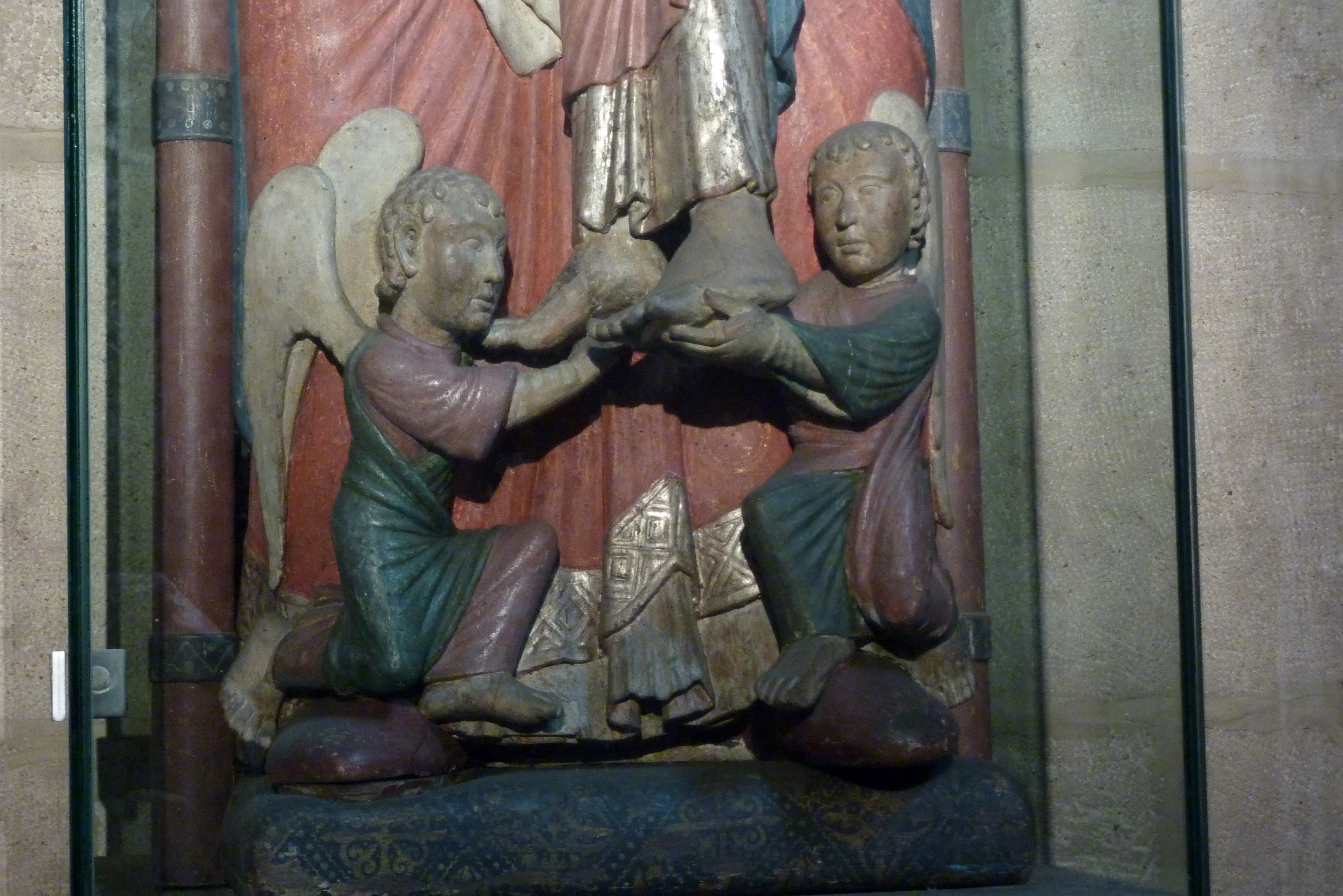 Katholische Pfarrkirche Saint-Martin in Jouy-en-Josas im Département Yvelines in der Region Île-de-France (Frankreich), Skulptur La Diège (Dei Genitrix/Gottesmutter) aus dem 12. Jahrhundert, Ausschnitt: Zwei Engel